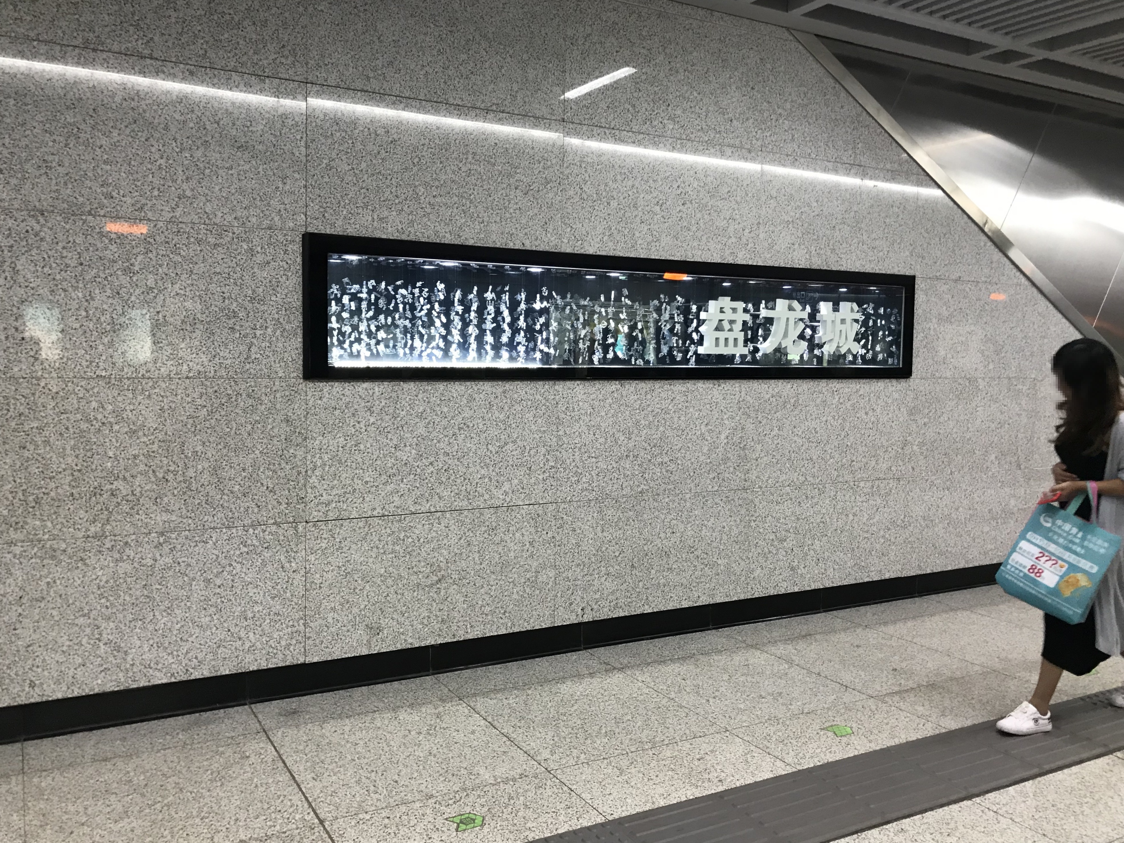 盤龍城駅の駅名標